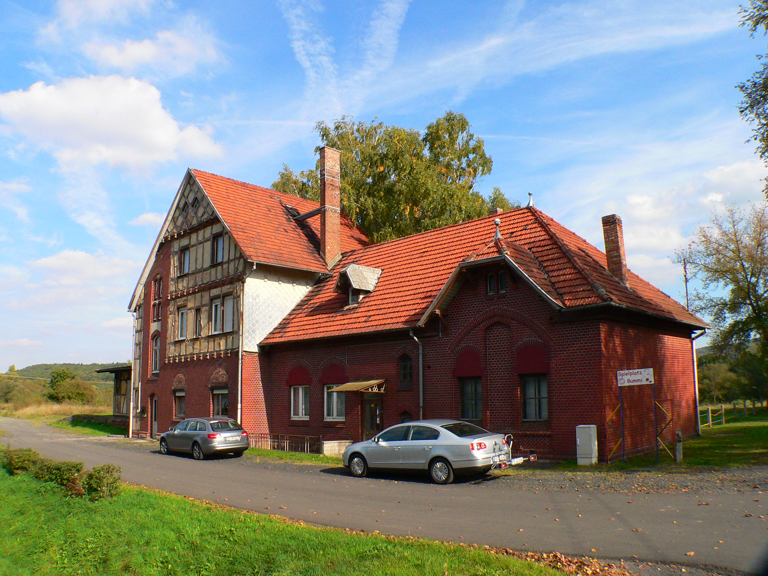 Bahnhof Wenigentaft. Schnittpunkt der ehemaligen Rhön-Bahnstrecken „Hünfeld-Wenigentaft“, „Ulstertalbahn“ (Vacha-Hilders) und „Wenigentaft-Oechsen“.